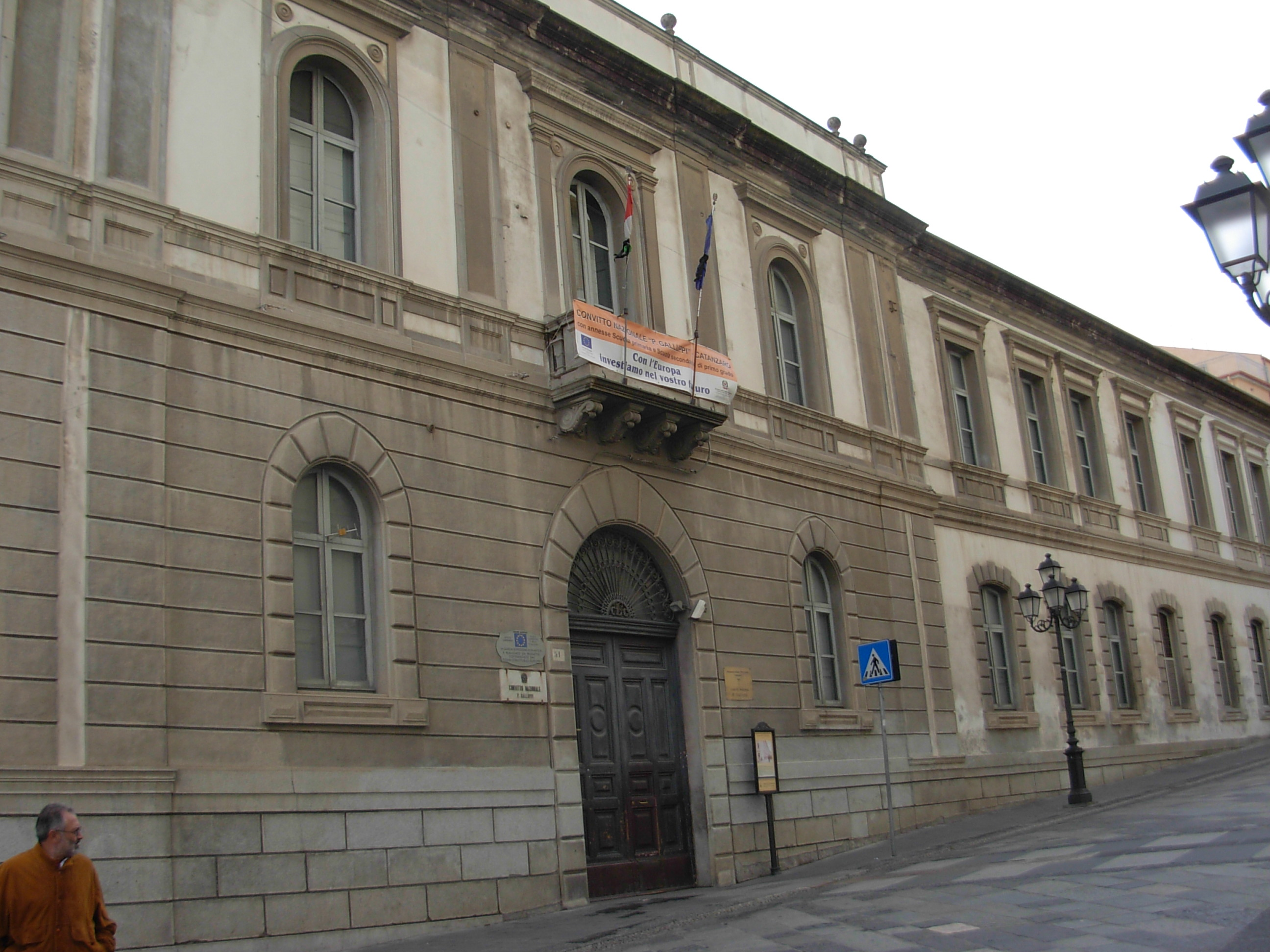 Catanzaro: Convitto Nazionale Pasquale Galluppi.